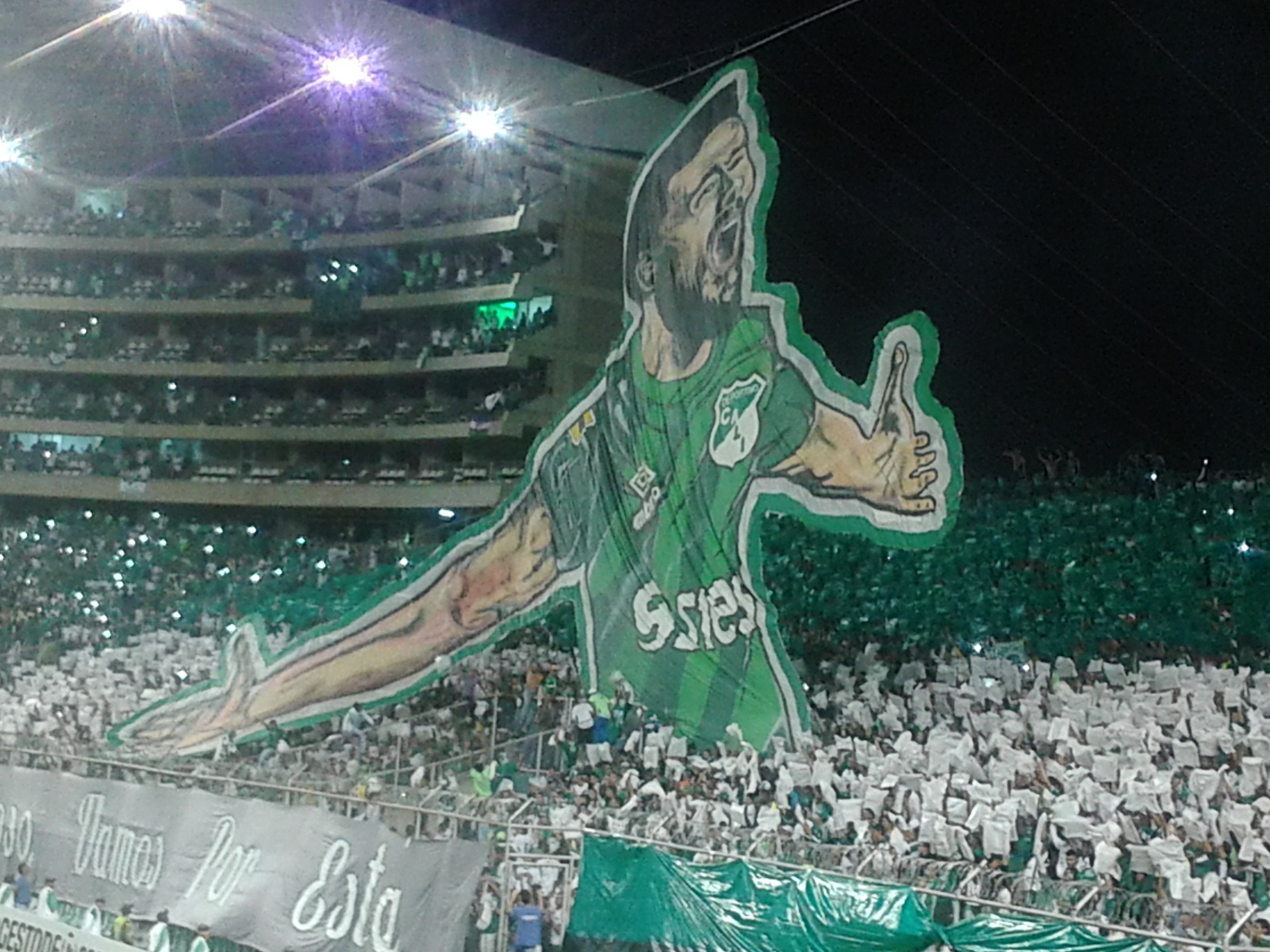 Encuentro entre Deportivo Cali y Boca Juniors en el Estadio Deportivo Cali por la Copa Libertadores 2016